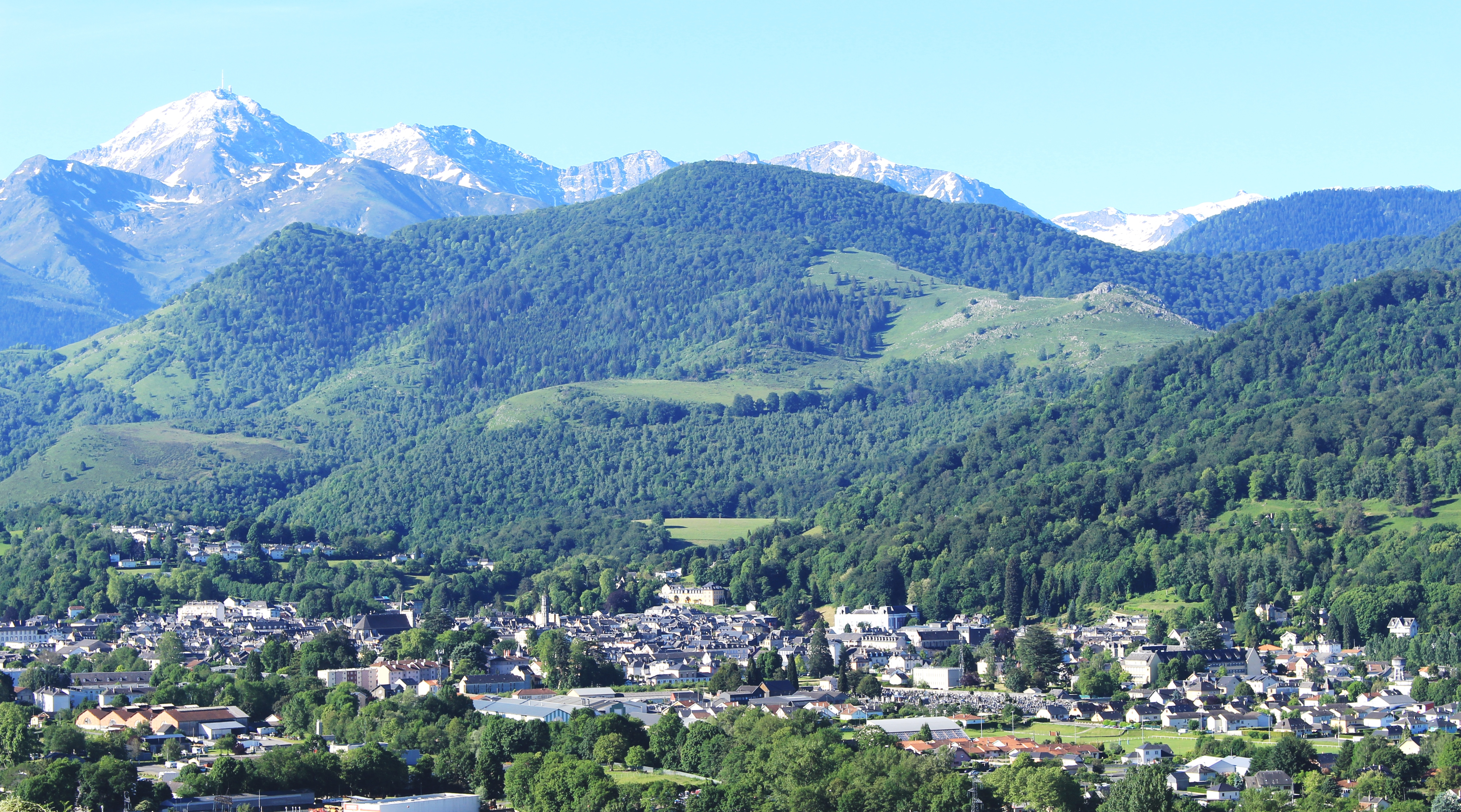 Bagnères-de-Bigorre (Hautes-Pyrénées)